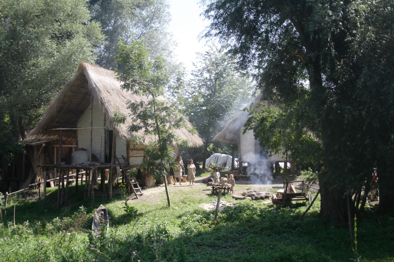 Die Pfahlbauten, Unteruhldingen